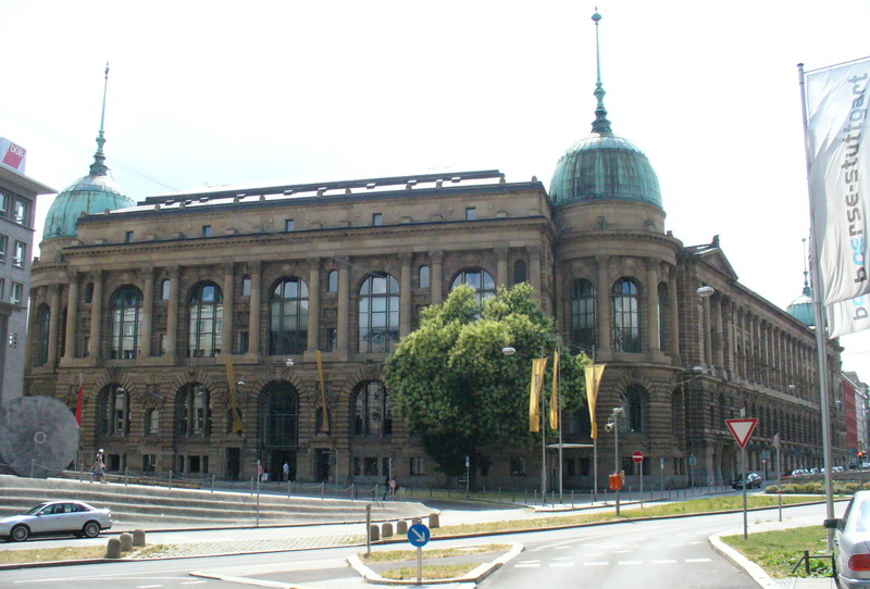 Stuttgart Haus der Wirtschaft + Designcenter